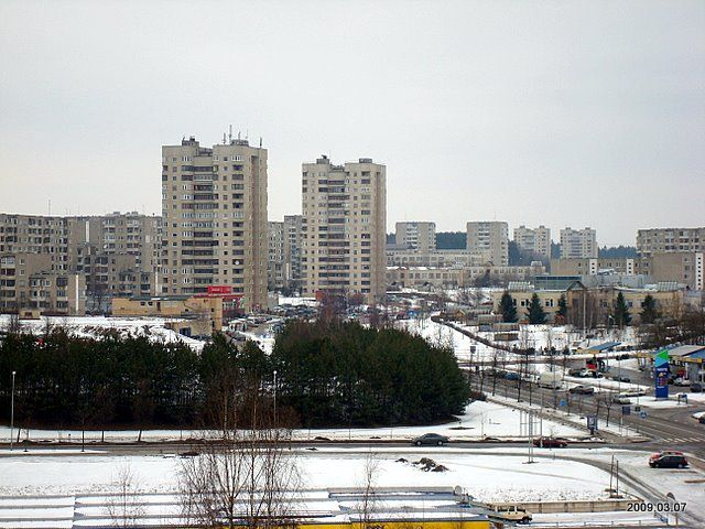 Фабионишкес